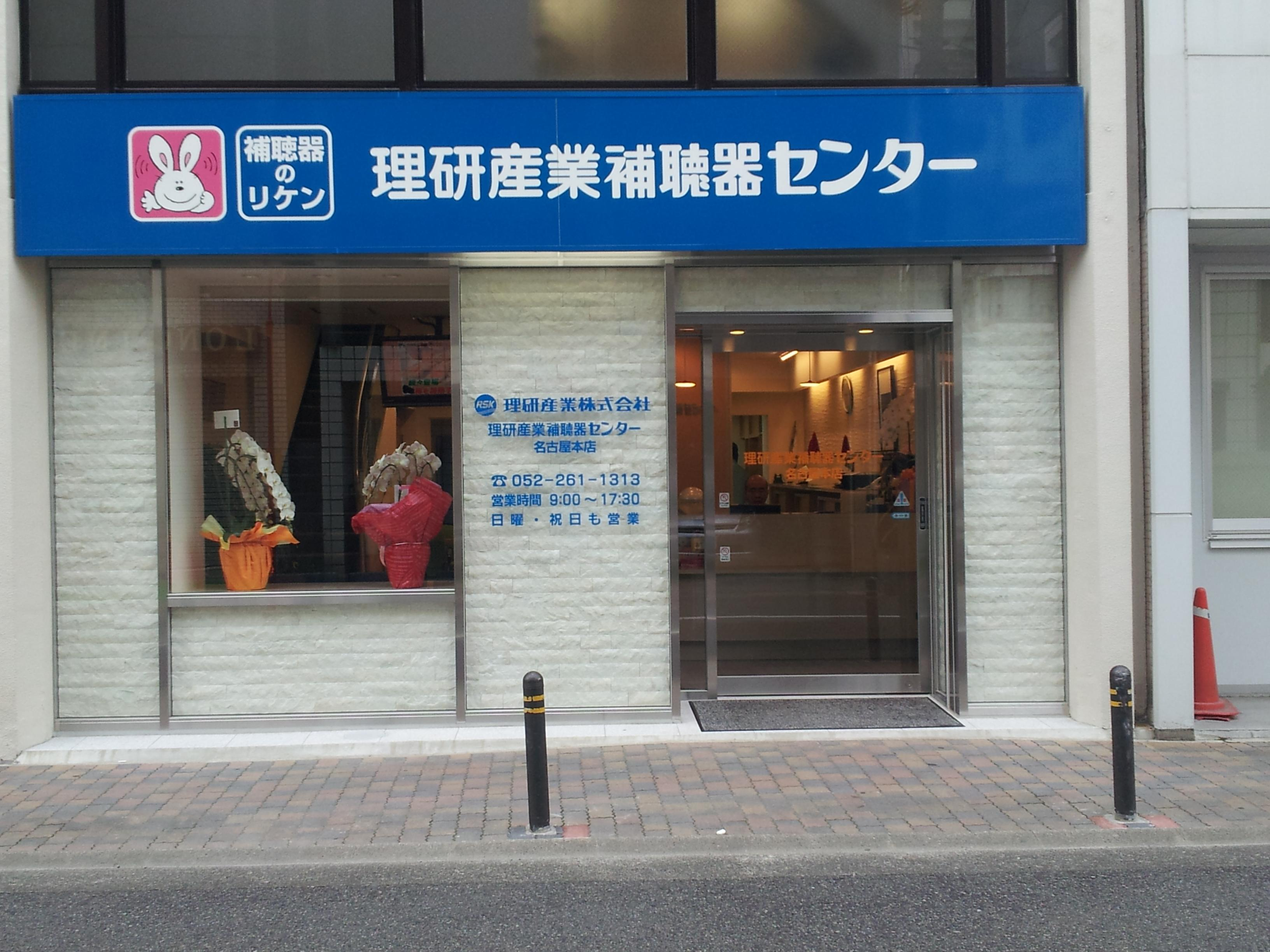 補聴器専門店